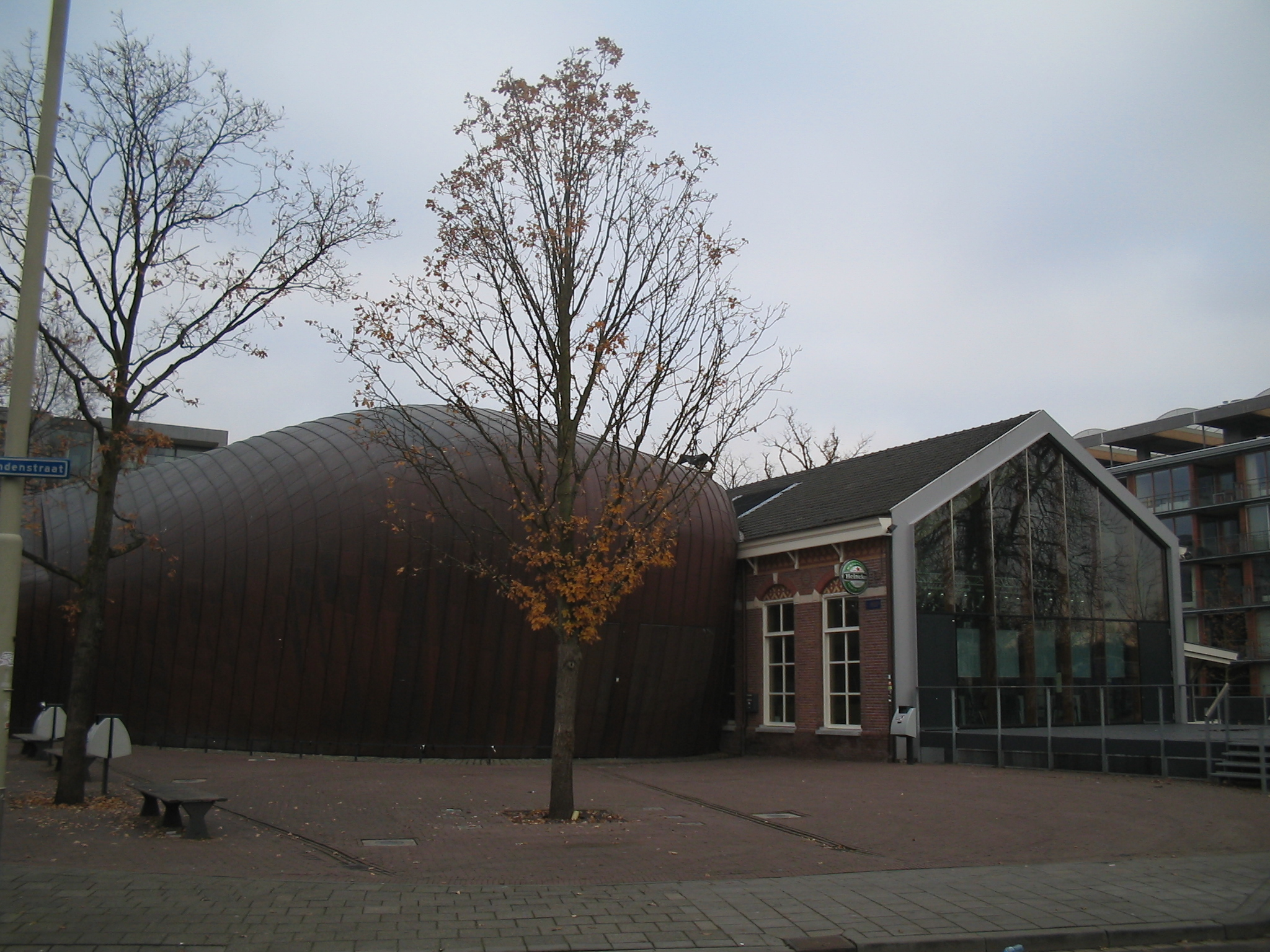 Zicht op een deel van het Poppodium Mezz in de Keizerstraat 101 in Breda, dec. 2005